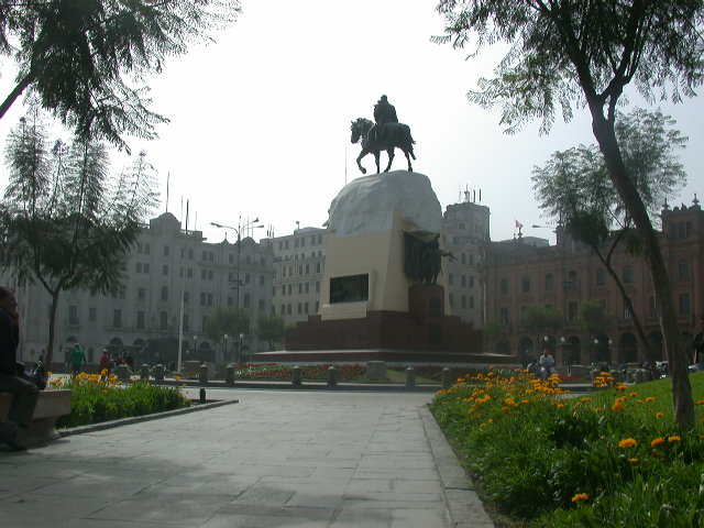 Plaza de San Martin - Lima, Peru